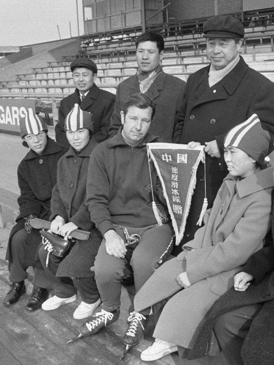 Training wereldkampioenschappen schaatsen dames in Heerenveen: Amerikaanse trainer John Werket met Chinese schaatsploeg.